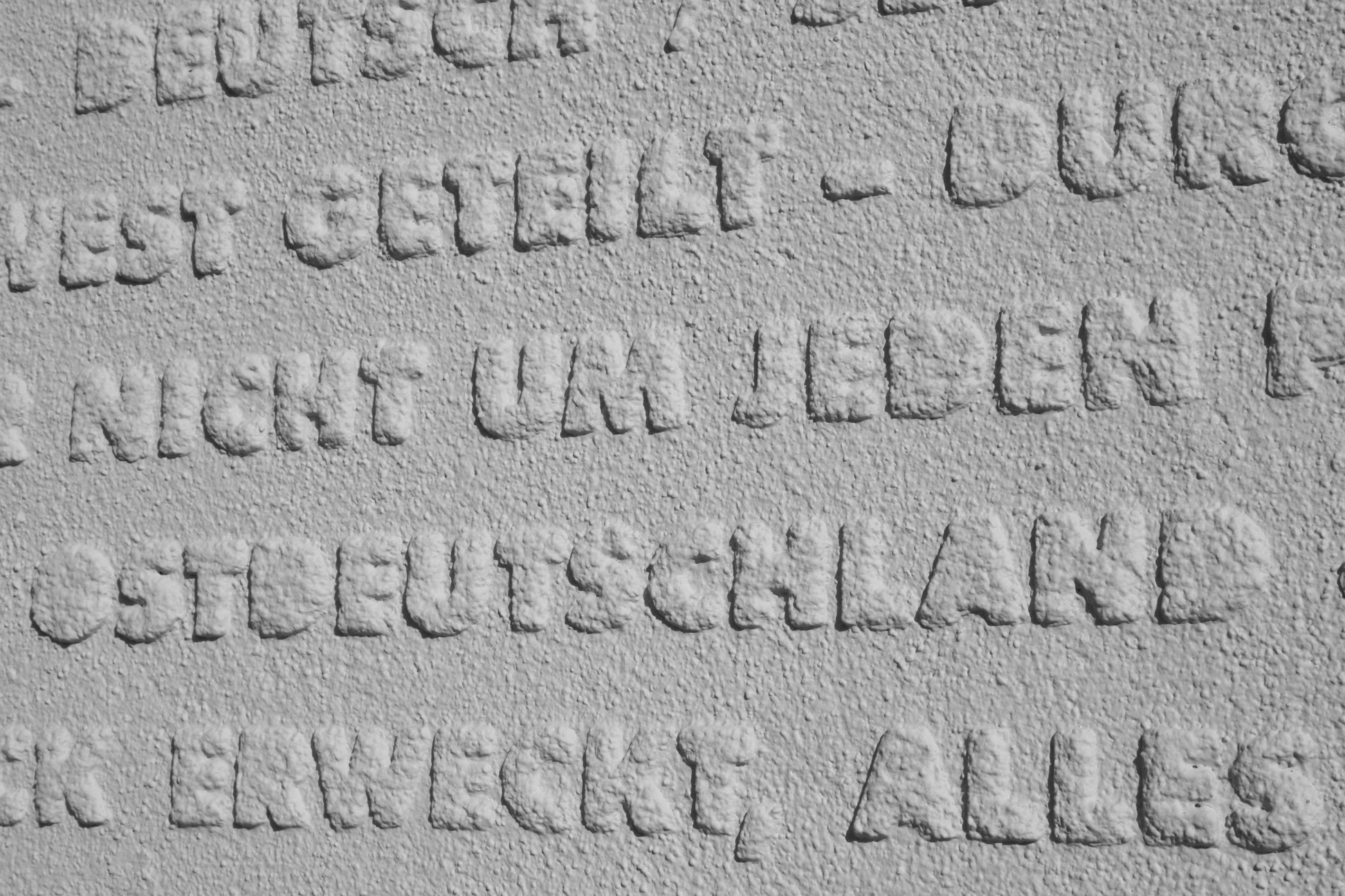 Denkmal Zur Deutschen Einheit, Denning, München: Profilschrift am Trafohäusschen, Detail